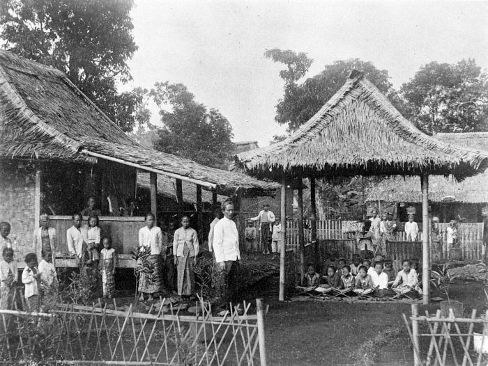 Repronegatief. Particuliere inlandse school te Buitenzorg, Java